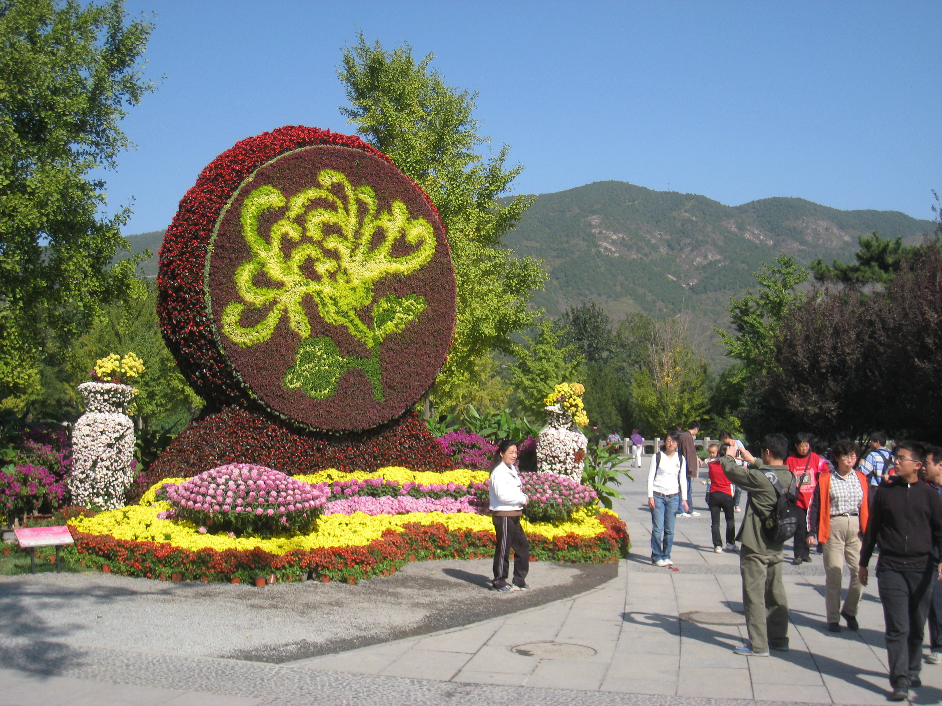 Beijing Botanical Garden (北京植物园), Beijing, China.